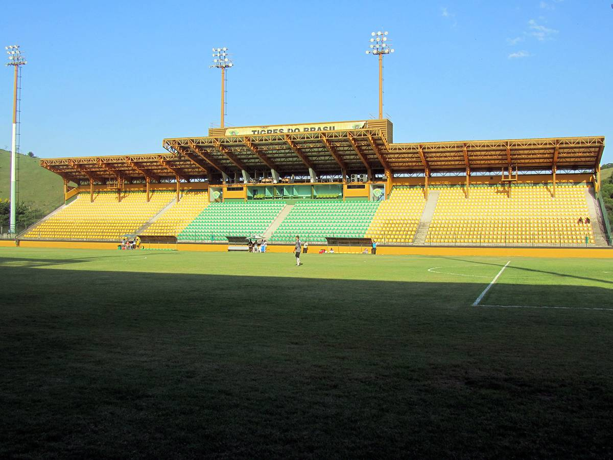 Estádio de Los Larios, em Xerém. Foto: Vitor Costa